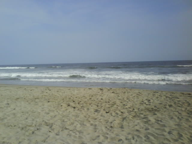 playa el dorado san marcos gro.